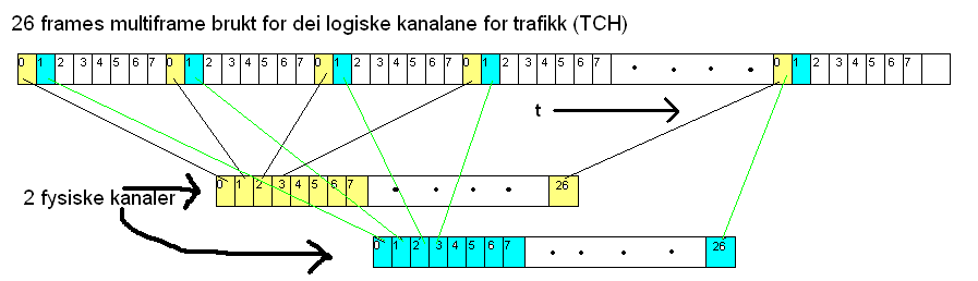 Korleis fysiske kanalar er oppbygd i GSM-systemet ved FDMA og TDMA multipleksing